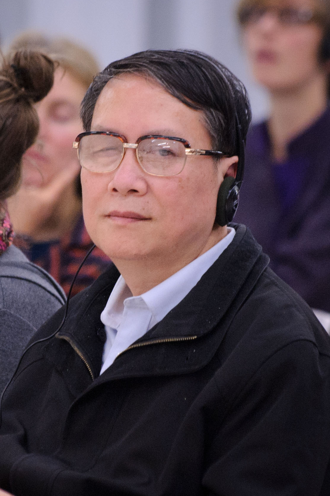 Prof. Qin Hui (Wirtschaftshistoriker und Osteuropa-Experte, Tsinghua Universität Peking) Foto: Stephan Röhl